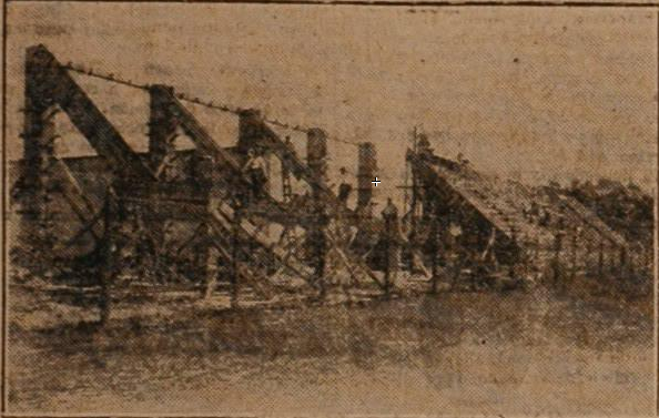 Contrucción del estadio de Unión de Santa Fe em 1928.